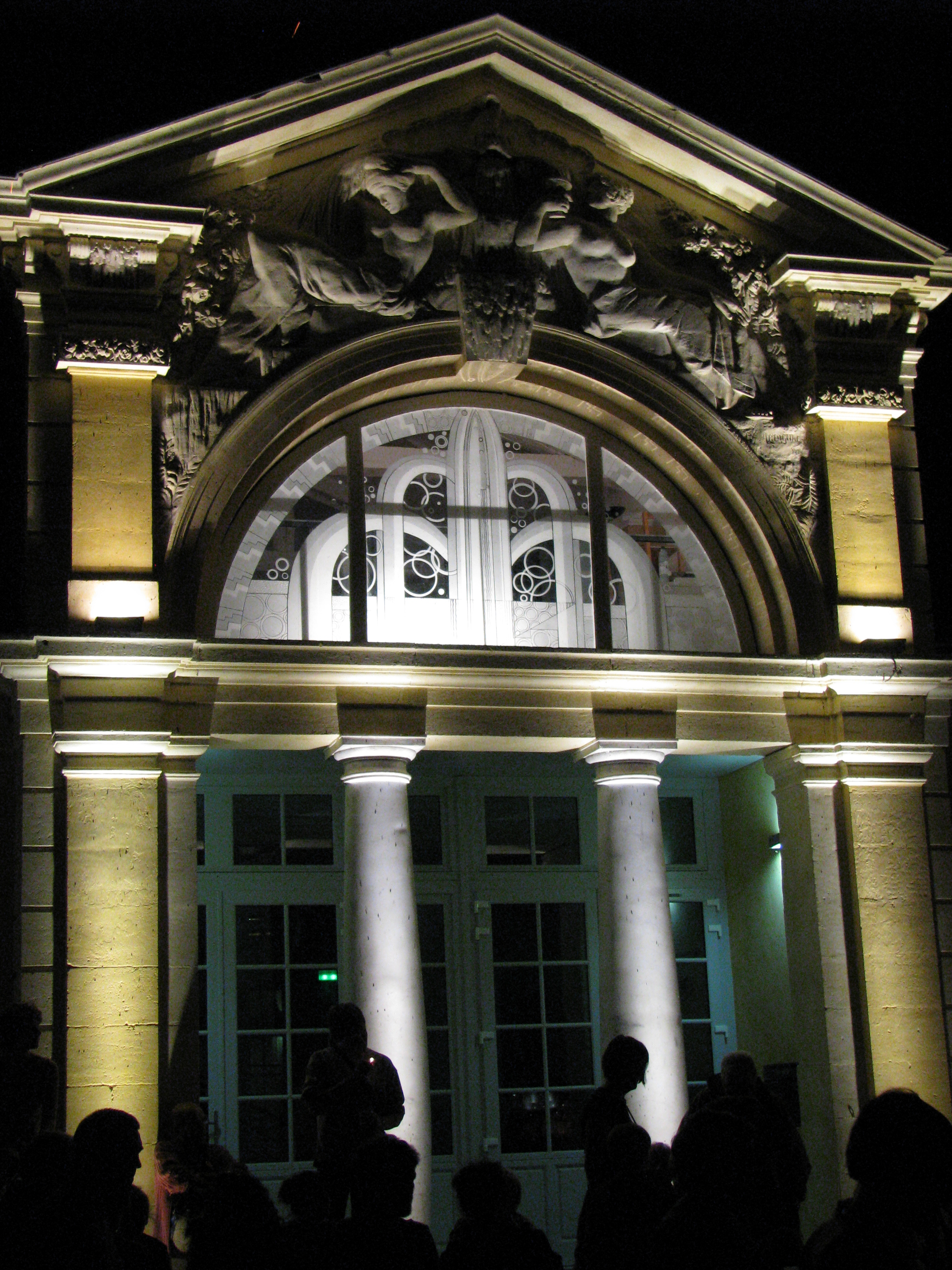 Entrée du centre national des arts de la rue des Pronomade(s), vue de nuit, le jour de son inauguration. Cette institution est hébergée dans le bâtiment réhabilité des anciens thermes d'Encausse-les-Thermes.